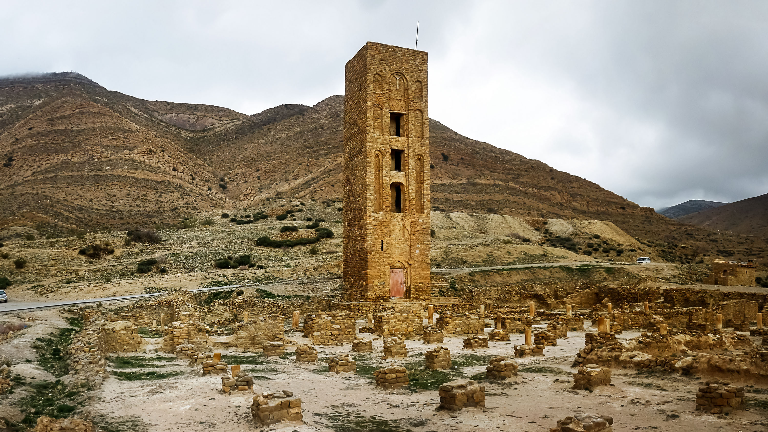 Site de la Citadelle des Beni Hammad a M'sila , commune de Maadid - Algérie موقع آثار قلعة بني حماد ببلدية المعضيد - ولاية المسيلة - الجزائر